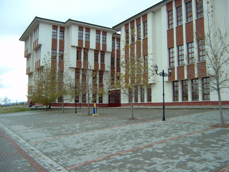 Dumlupınar Üniversitesi Sosyal Bilimler Enstitüsü Binasi